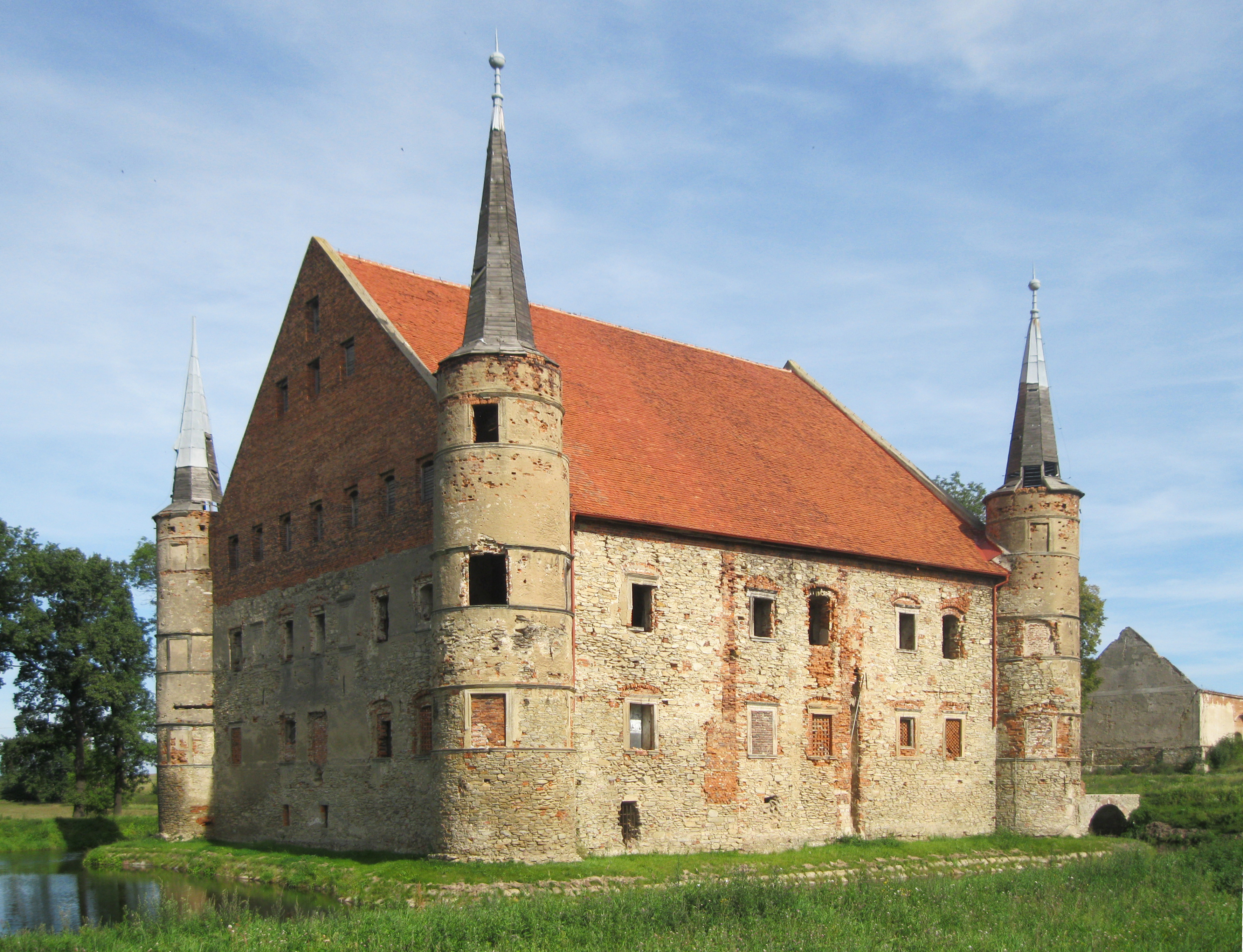 Piotrowice Świdnickie - dwór obronny, widok od strony szosy (zabytek nr rejestr. A/4490/289 z dn. 11.05.1951)